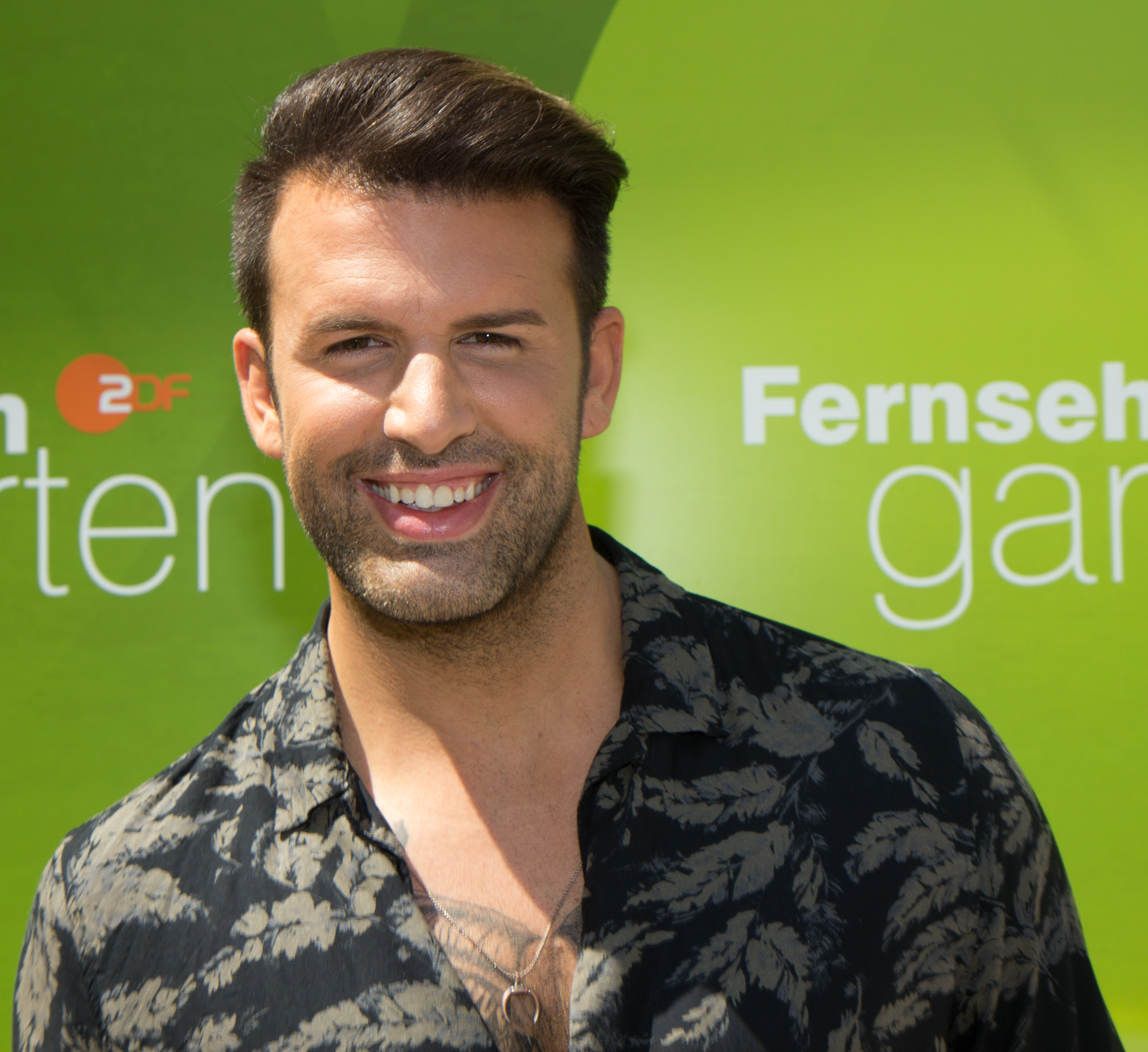 Jay Khan als Gast beim ZDF-Fernsehgarten am 21. Mai 2018 in Mainz.